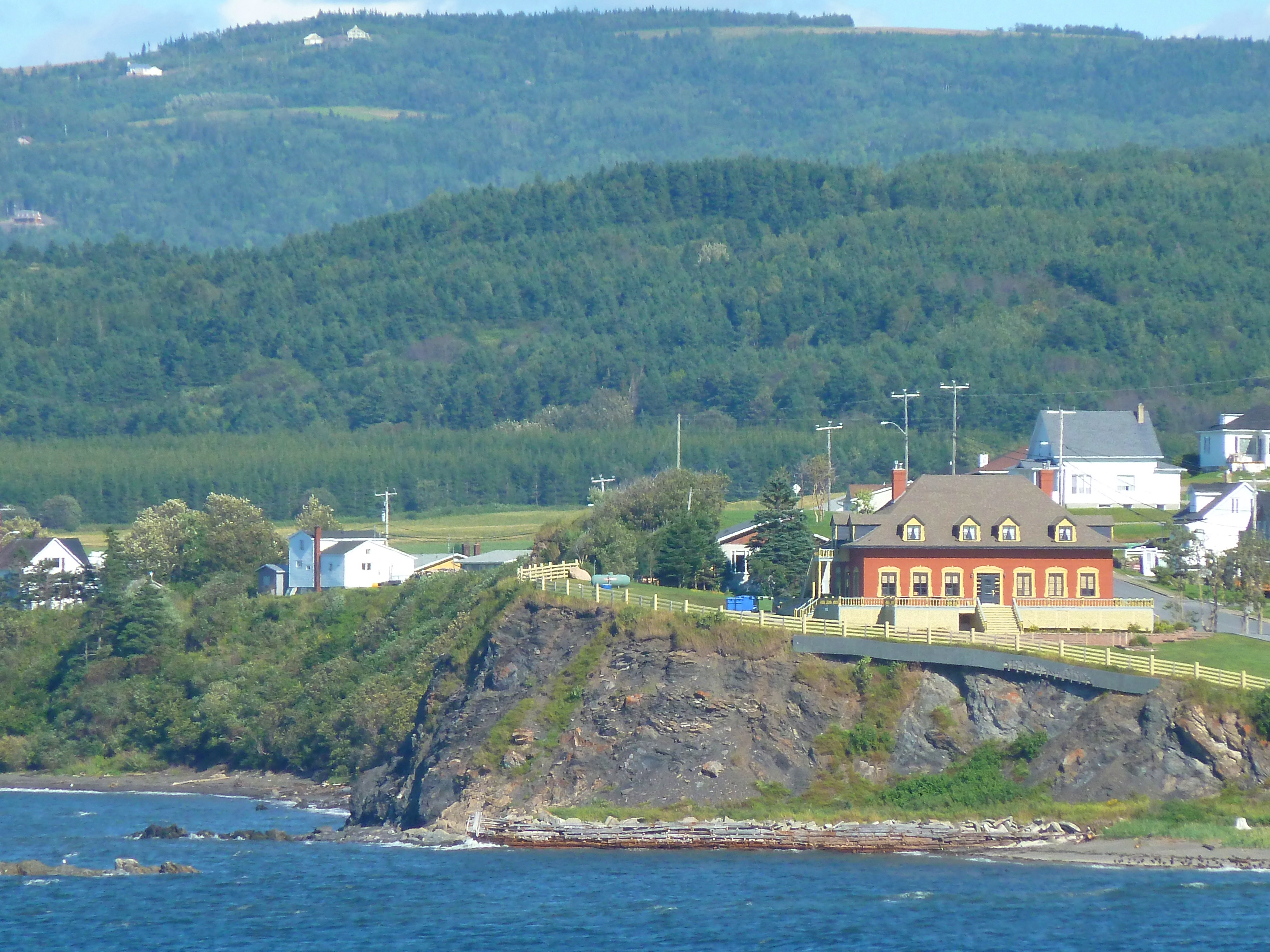 Maison Théodore-Jean-Lamontagne, 170, 1re Avenue Est, Sainte-Anne-des-Monts (Canada). (Protection MH reconnu. Voir la liste des lieux patrimoniaux de la Gaspésie–Îles-de-la-Madeleine pour plus de détails).